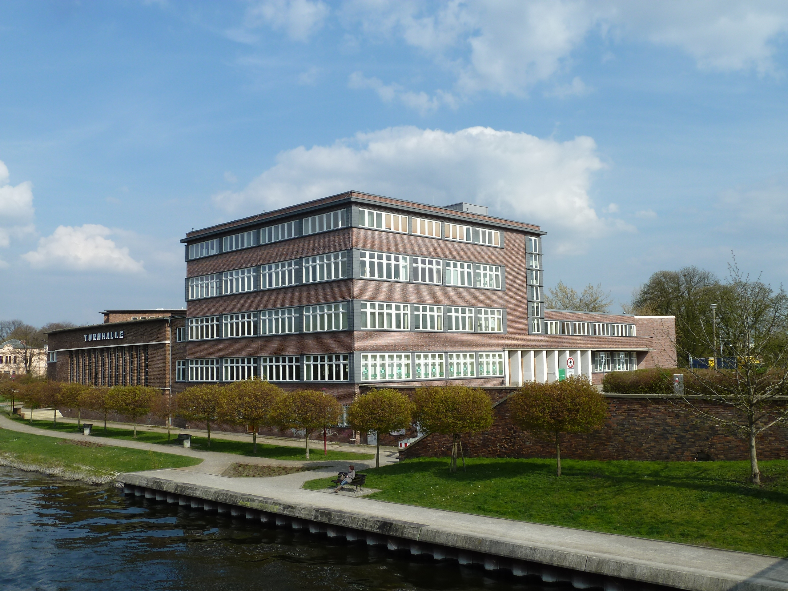 Wohlfahrtsforum in Brandenburg an der Havel, BaudenkmalUnknown